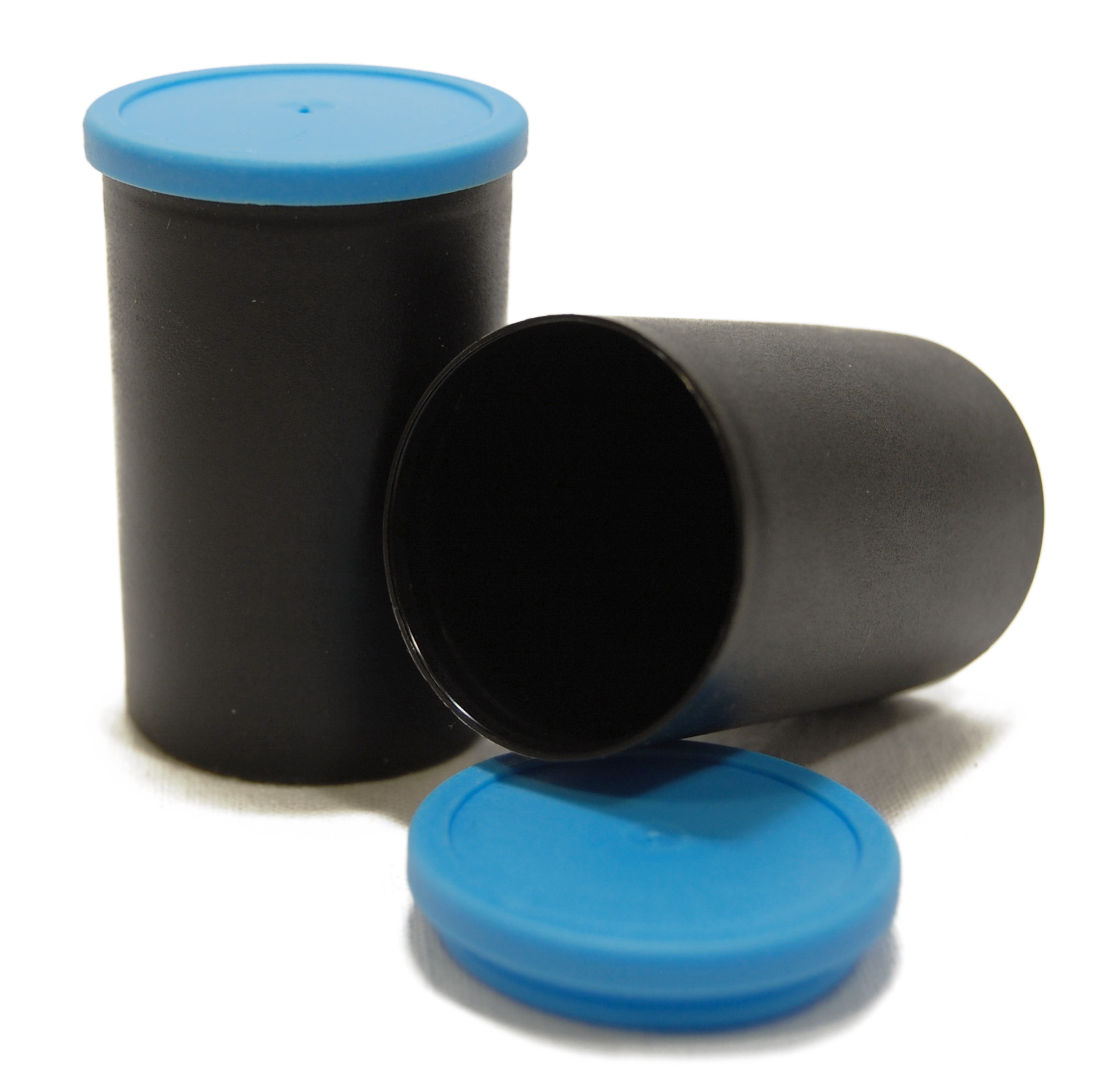 Filmdose für 35mm Foto-Film